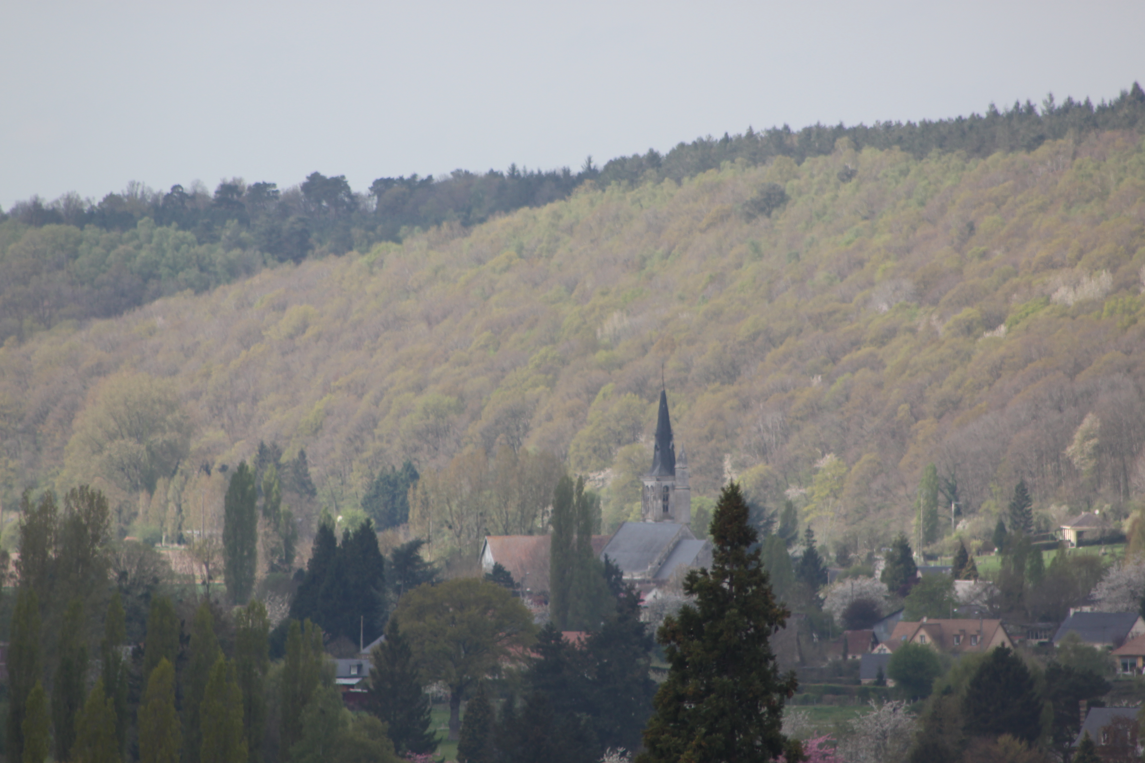 Vue d'Annebault